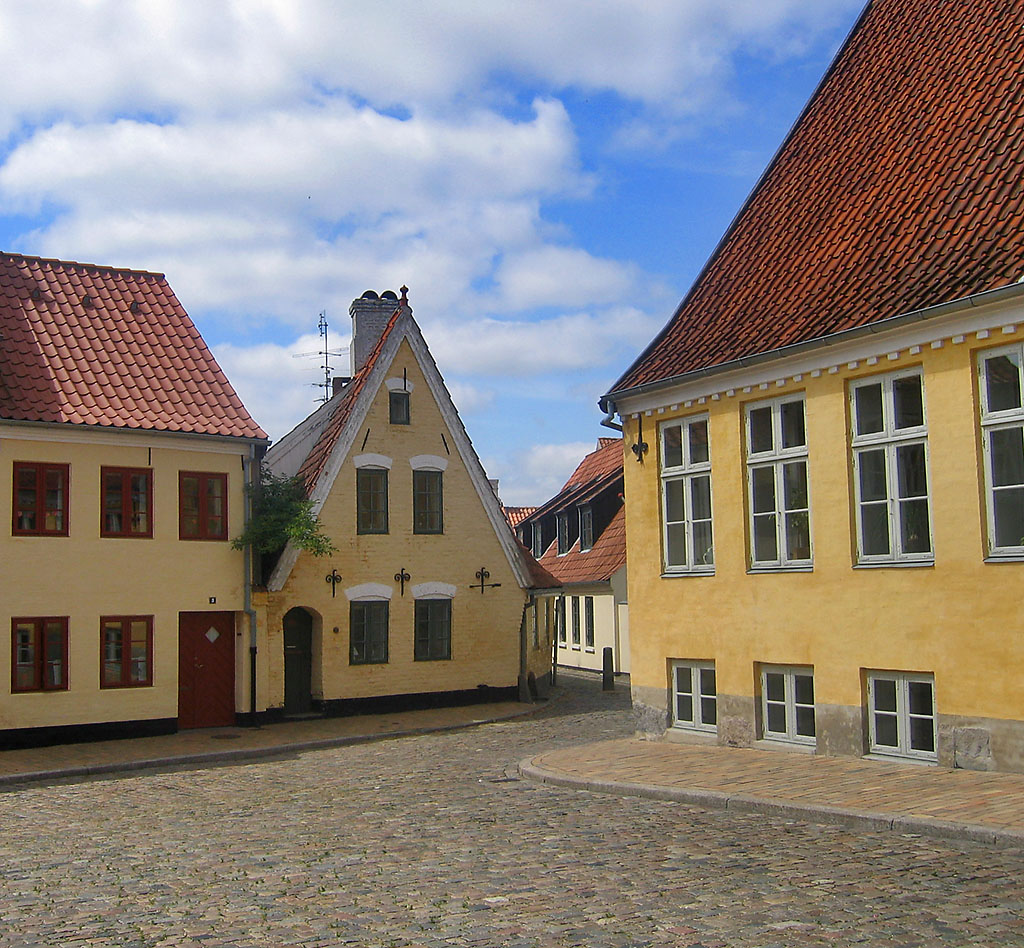 Aabenraa, Denmark